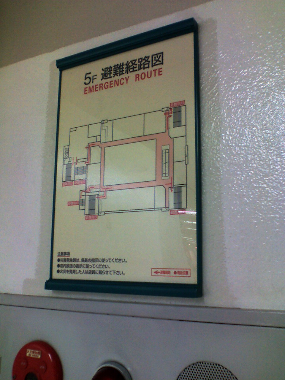 Evacuation route sign(避難経路の標識3)